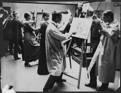 Viipurin taiteenystävien piirustuskoululaisia; telineiden äärellä